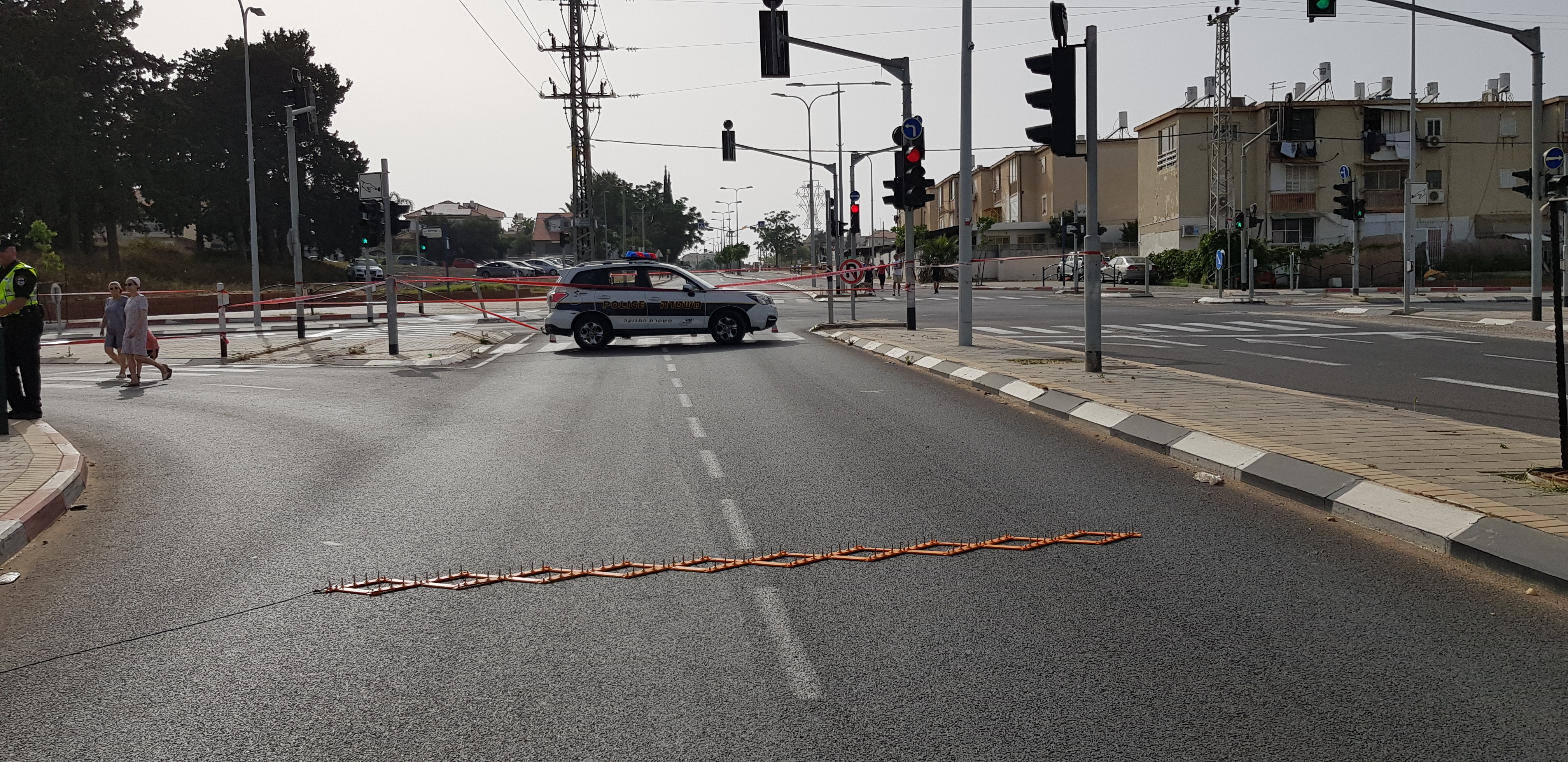 חסימת כביש על־ידי משטרת ישראל